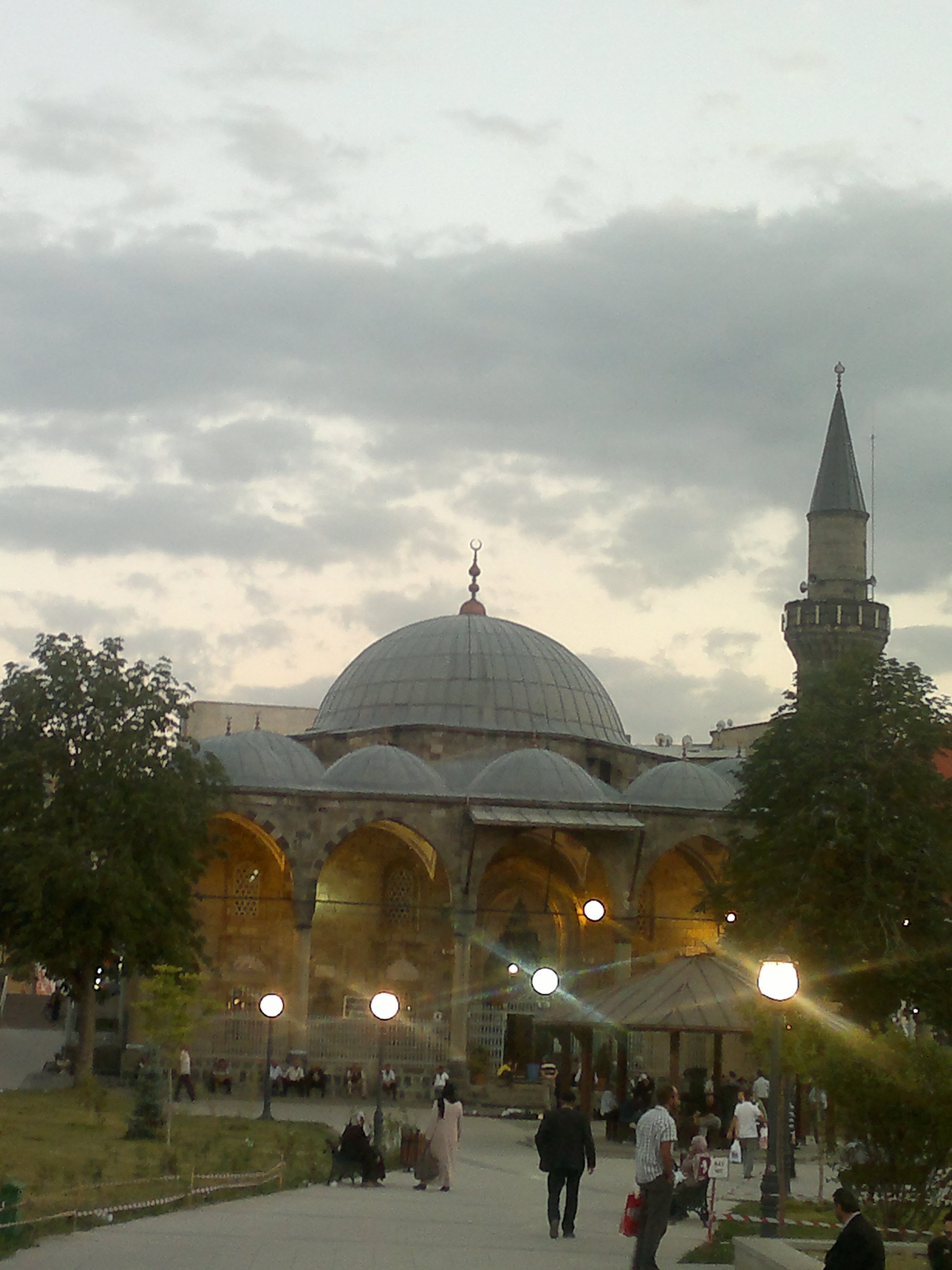 Erzurum Lala Mustafa Paşa Camii, Türkiye'de Erzurum İli merkez ilçesi Yakutiye'de 1562 yılında Lala Mustafa Paşa tarafından yaptırılmış Erzurum ’daki ilk Osmanlı camisidir.